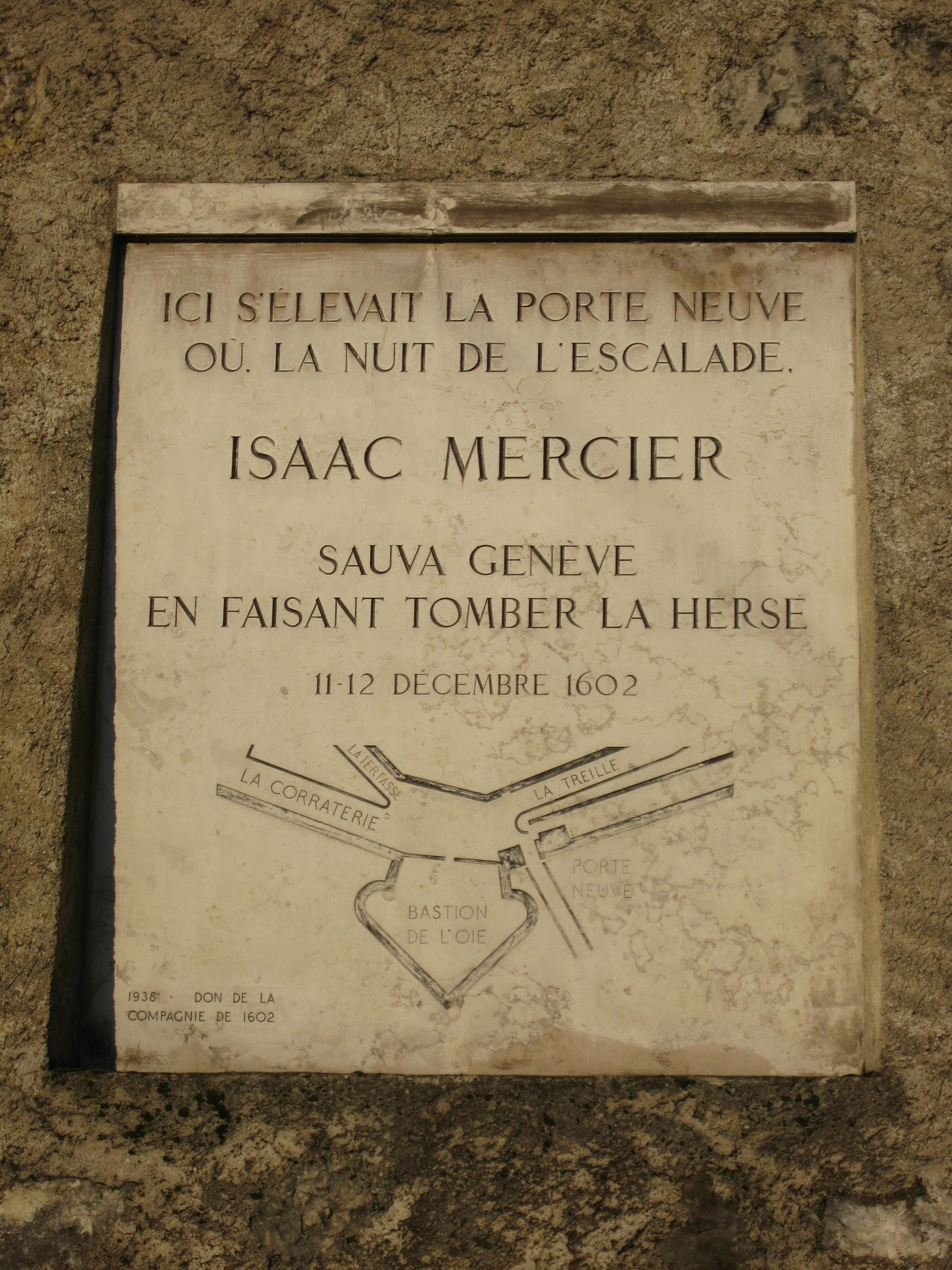 Plaque commémorative située à la Place neuve, rappelant l'acte héroïque d'Isaac Mercier ainsi que la toponymie des lieux en 1602.